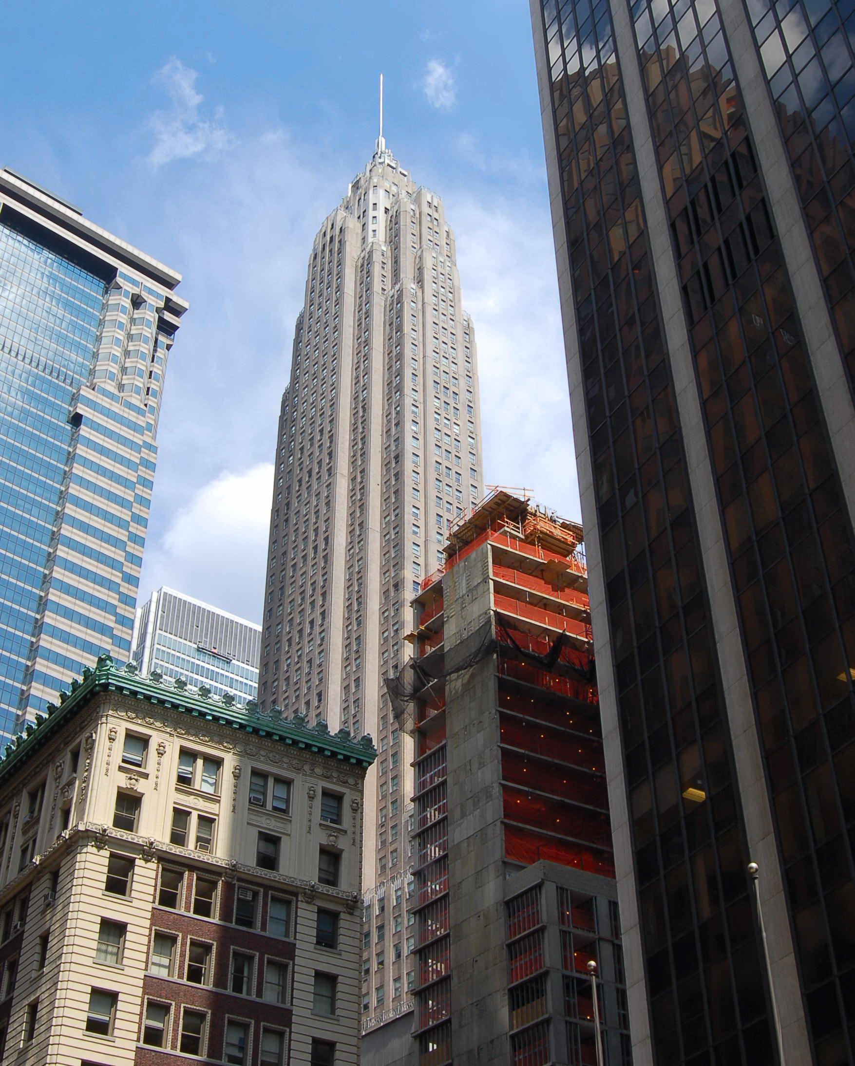 L'American International Building (gratte-ciel de Manhattan, sis au n°70 Pine Street, à New York).